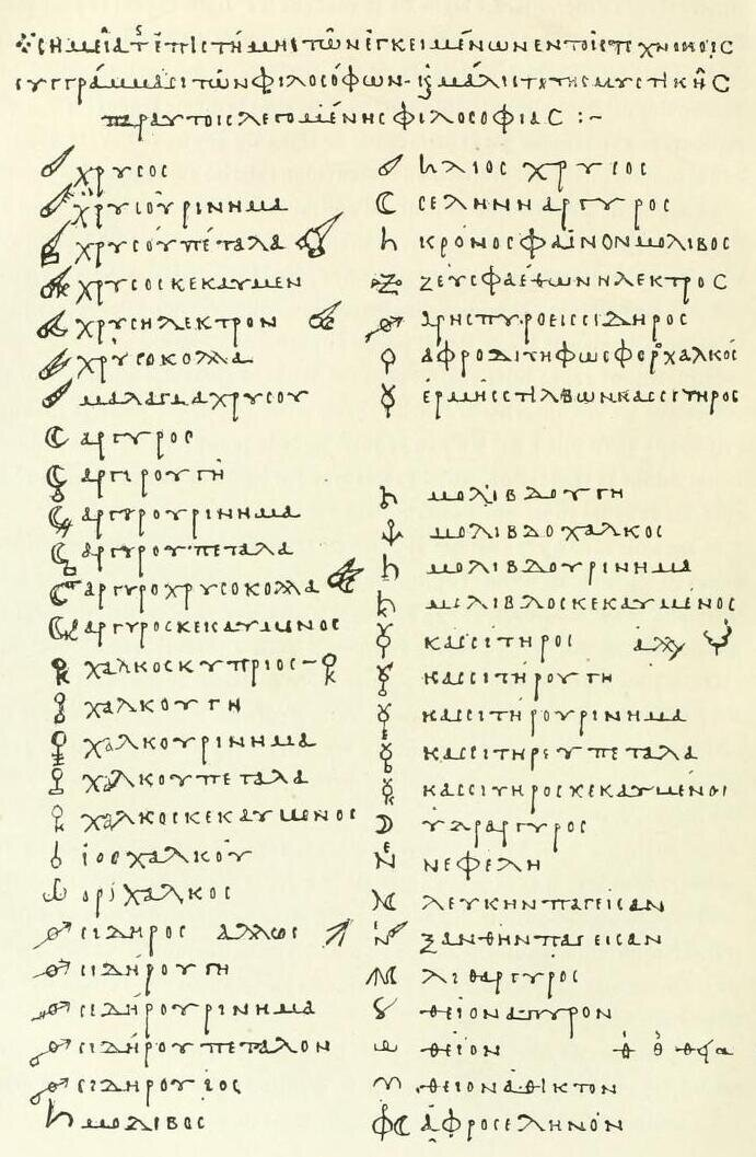 reproduction du folio 6, du manuscrit Marcianus graecus 299, on lit Χρυσος (or) Χρυσος ρινημα (limaille d'or)